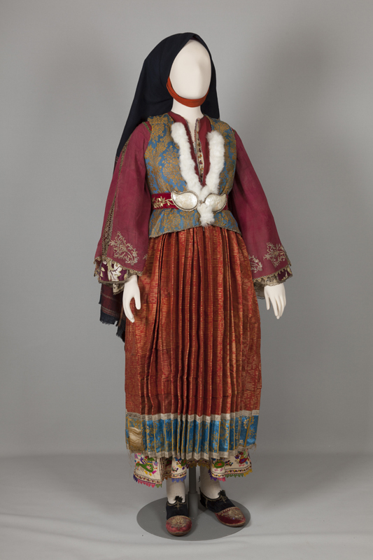 Νυφική ή γιορτινή φορεσιά Σκύρος, Σποράδες. Αρχές 20ού αιώνα Συλλογή Πελοποννησιακού Λαογραφικού Ιδρύματος, Ναύπλιο